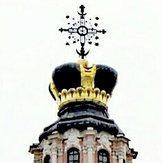 Von Jonas Mulokas wiedererrichtete Krone auf der Kuppel von St. Casimir in Vilnius.